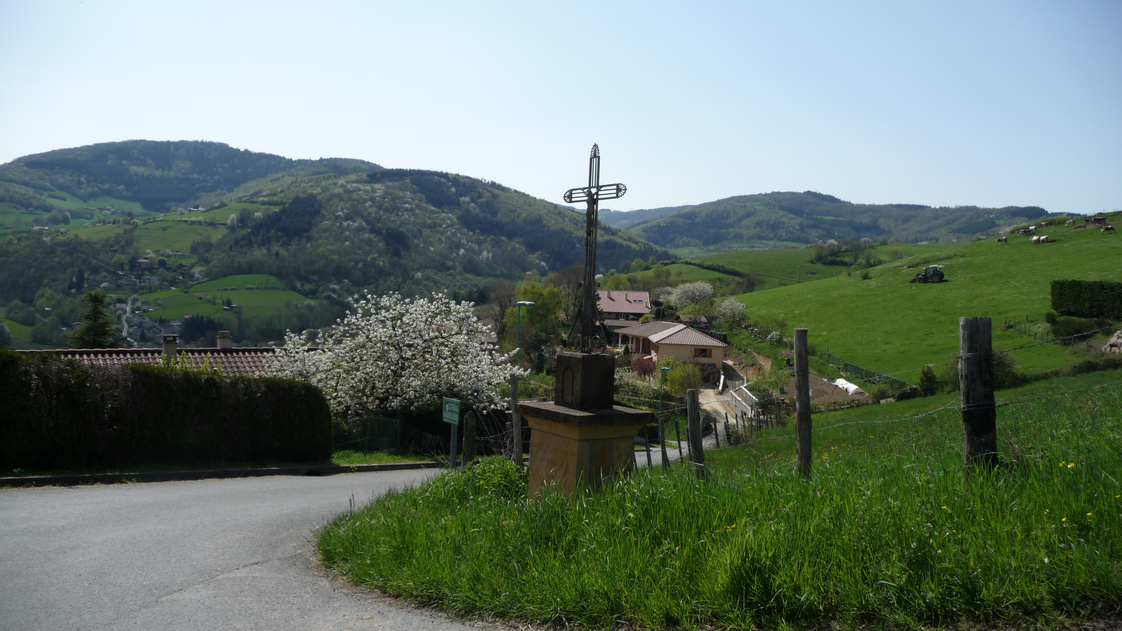 Saint-Forgeux - croix sur la route de la chapelle de Grévilly